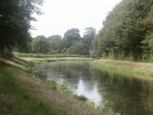 River Niers in Weeze Germany